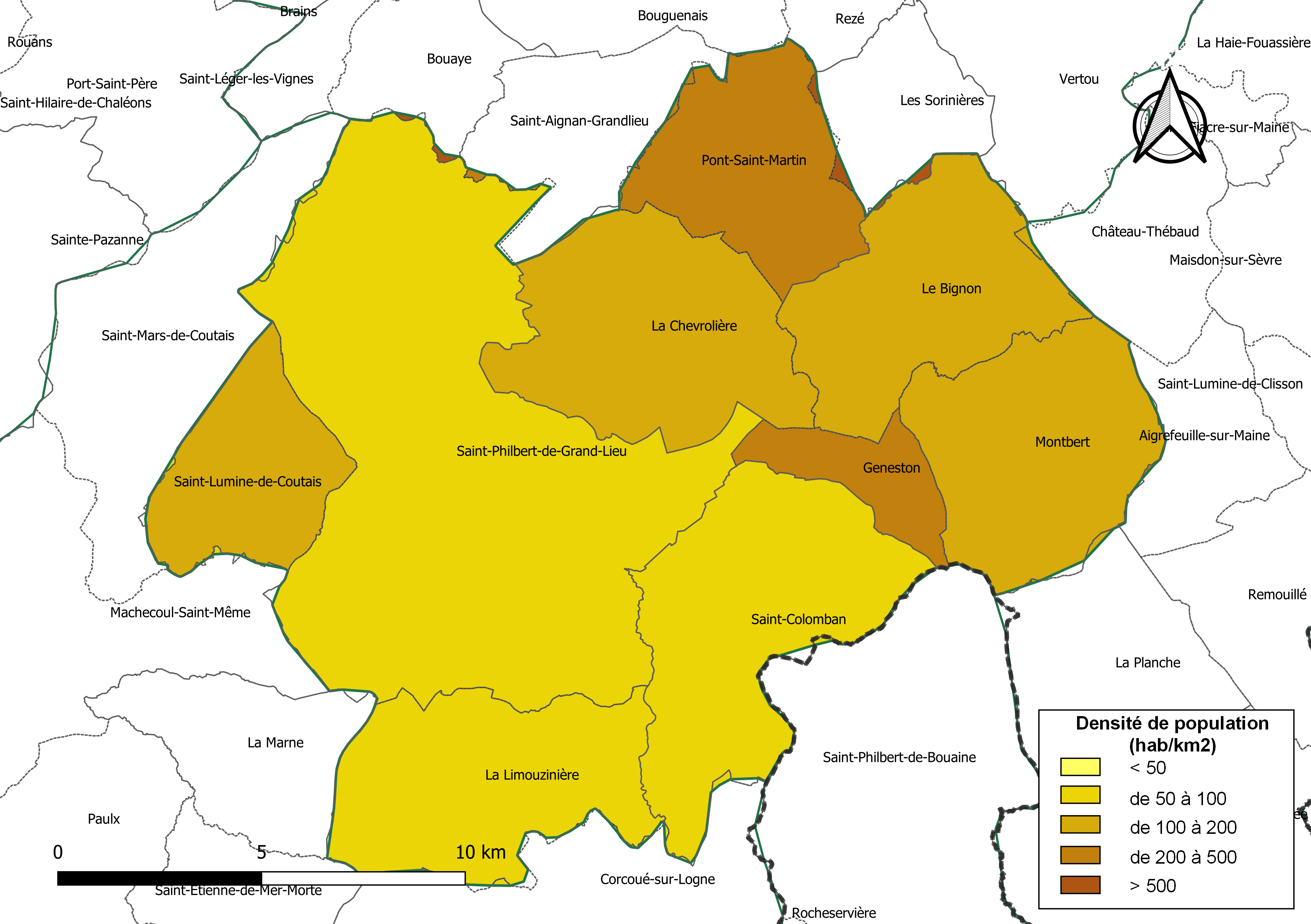 Carte des densités de population (millésimée 2016) des communes de la Communauté de communes de Grand Lieu, département de la Loire-Atlantique, France. Composition au 1er janvier 2019.